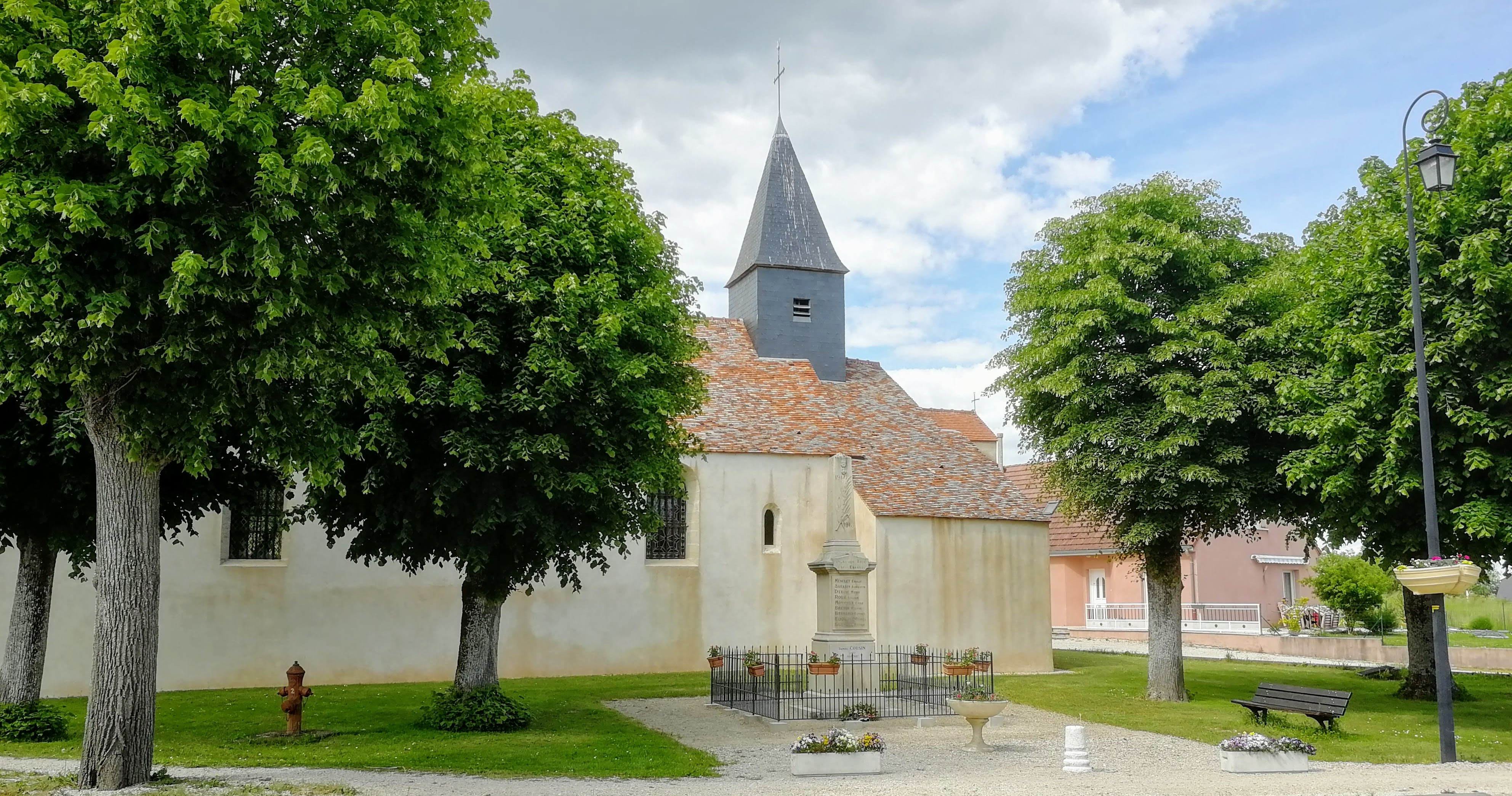 Magny-sur-Tille, Côte d'Or, Bourgogne, France